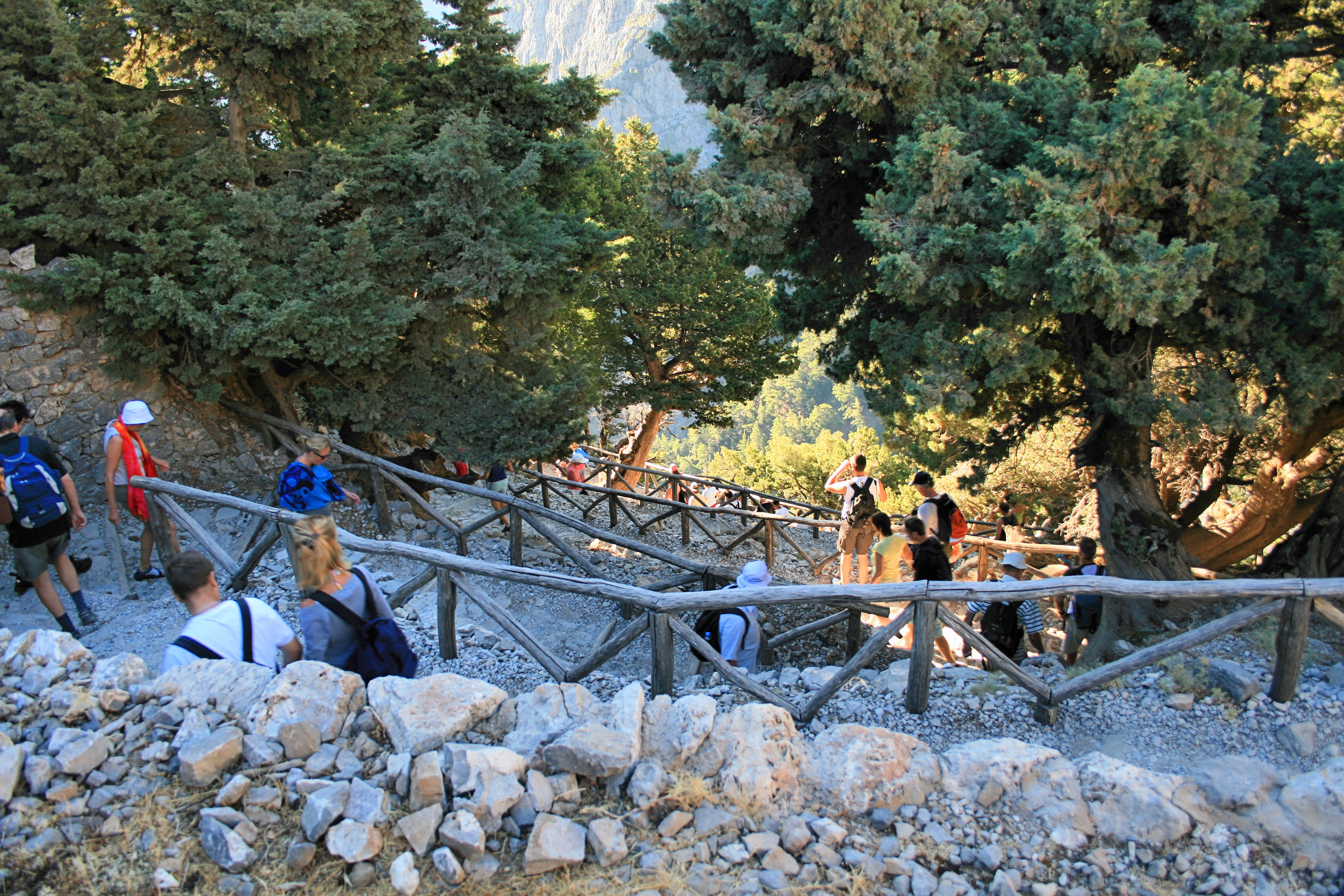 Der nördliche Zugang zur Samaria-Schlucht bei Xyloskalo (hölzerne Treppe) auf der Insel Kreta